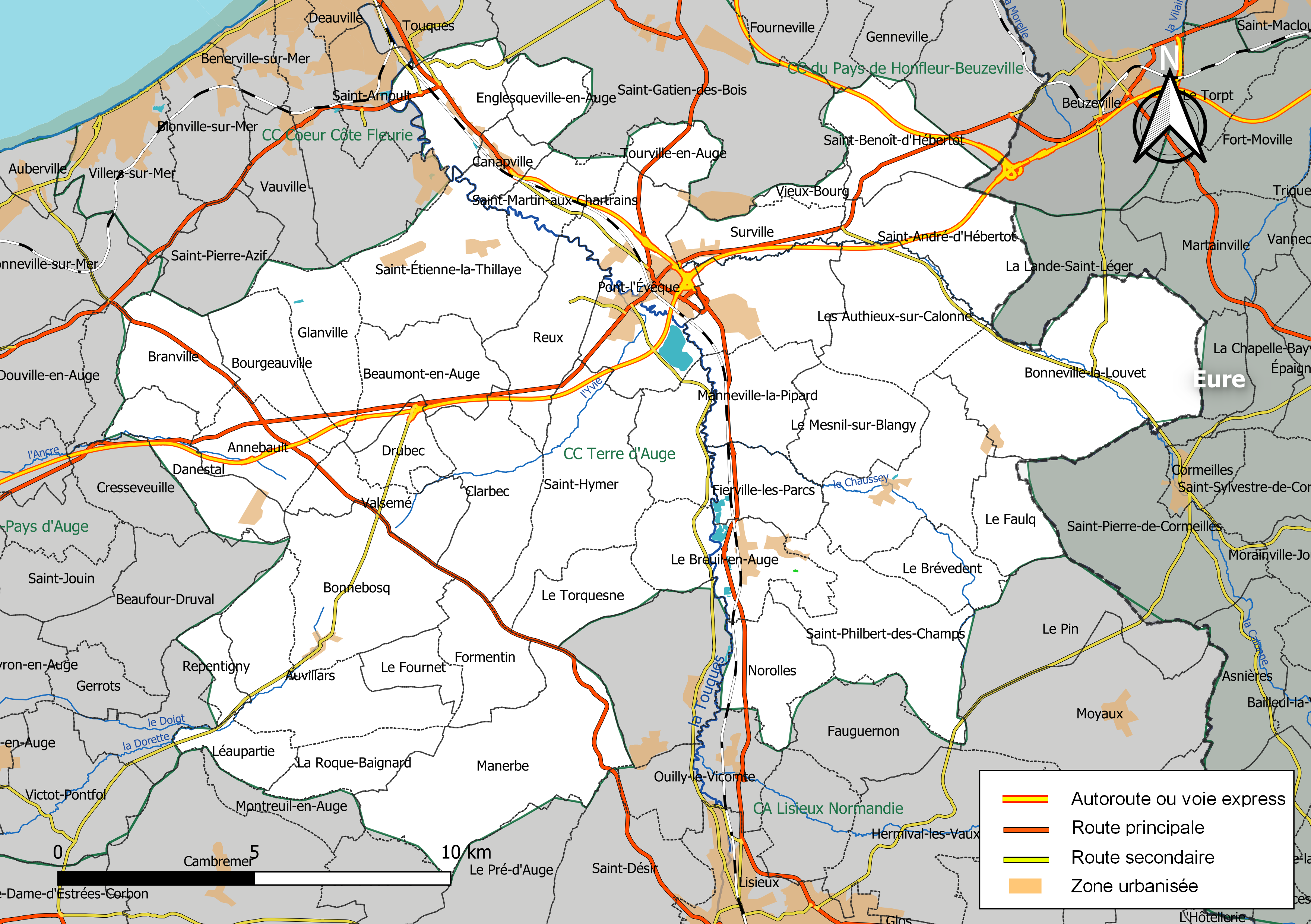 Carte géographique de la Communauté de communes Terre d'Auge, département du Calvados, France. Composition au 1er janvier 2019.